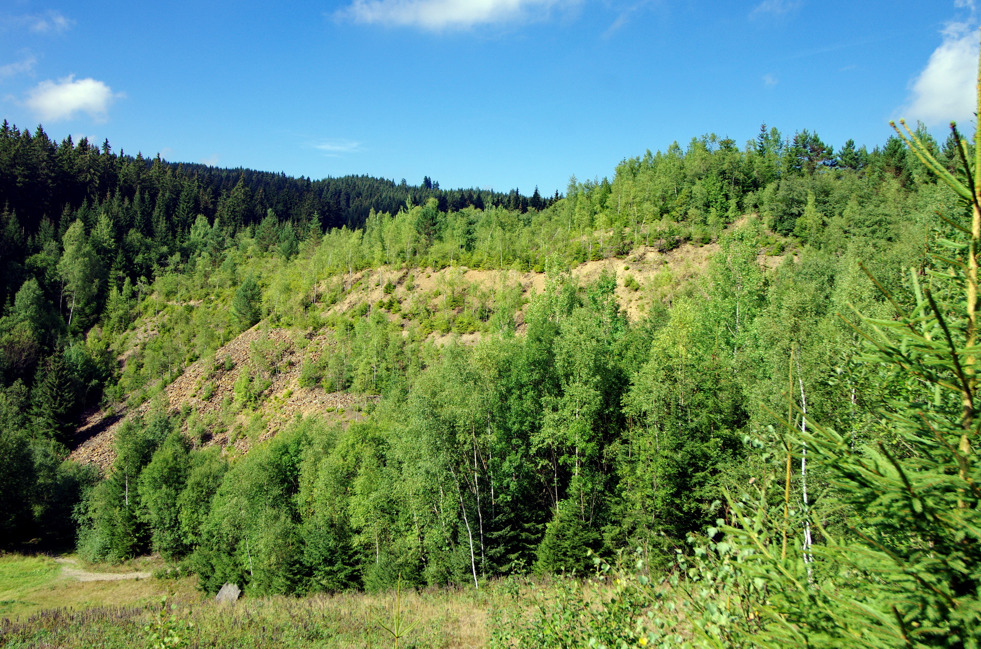 Jáchymov, odvaly bývalé šachty Eduard, Krušné hory, okres Karlovy Vary